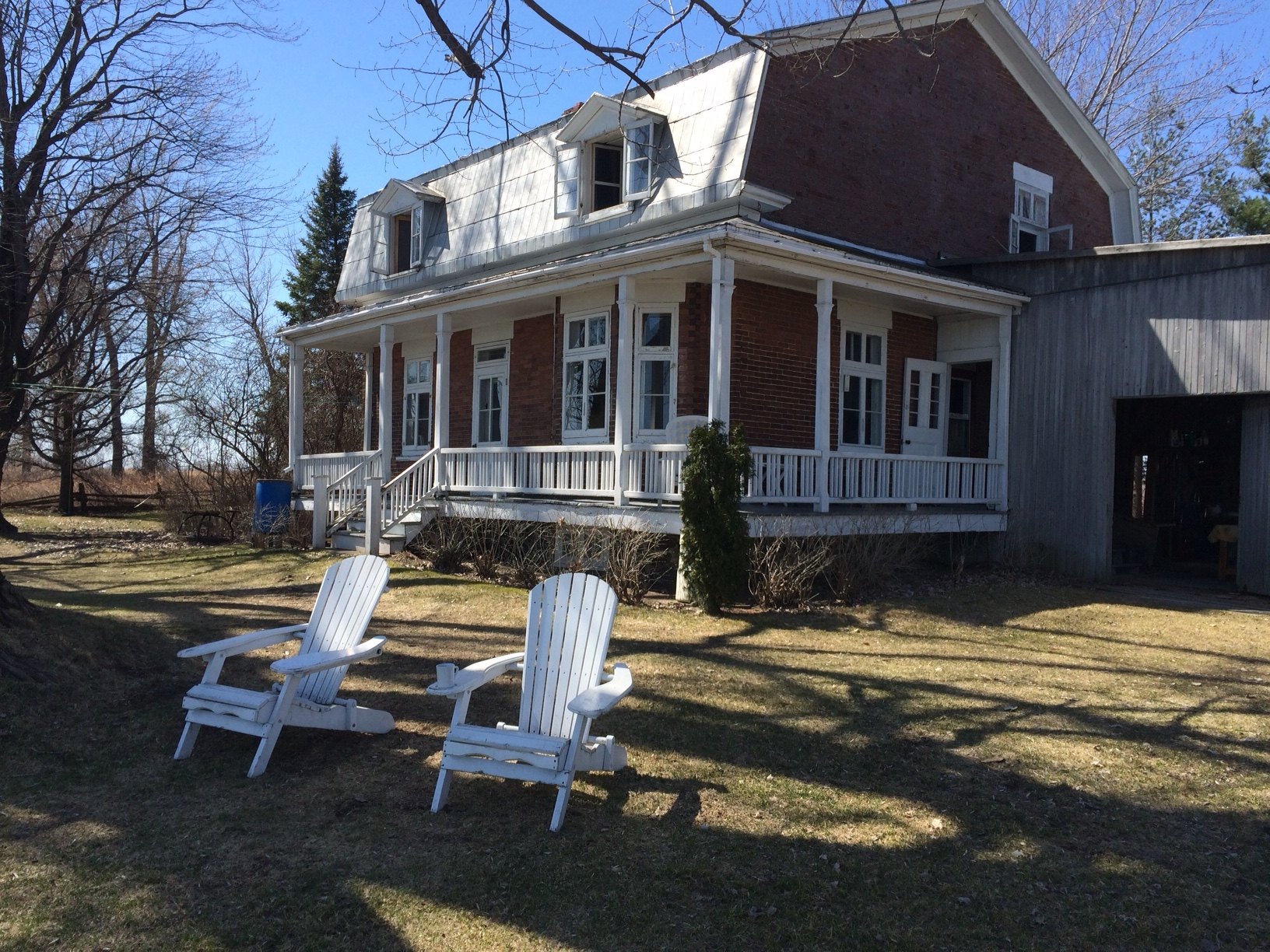 Photo prise en 2016